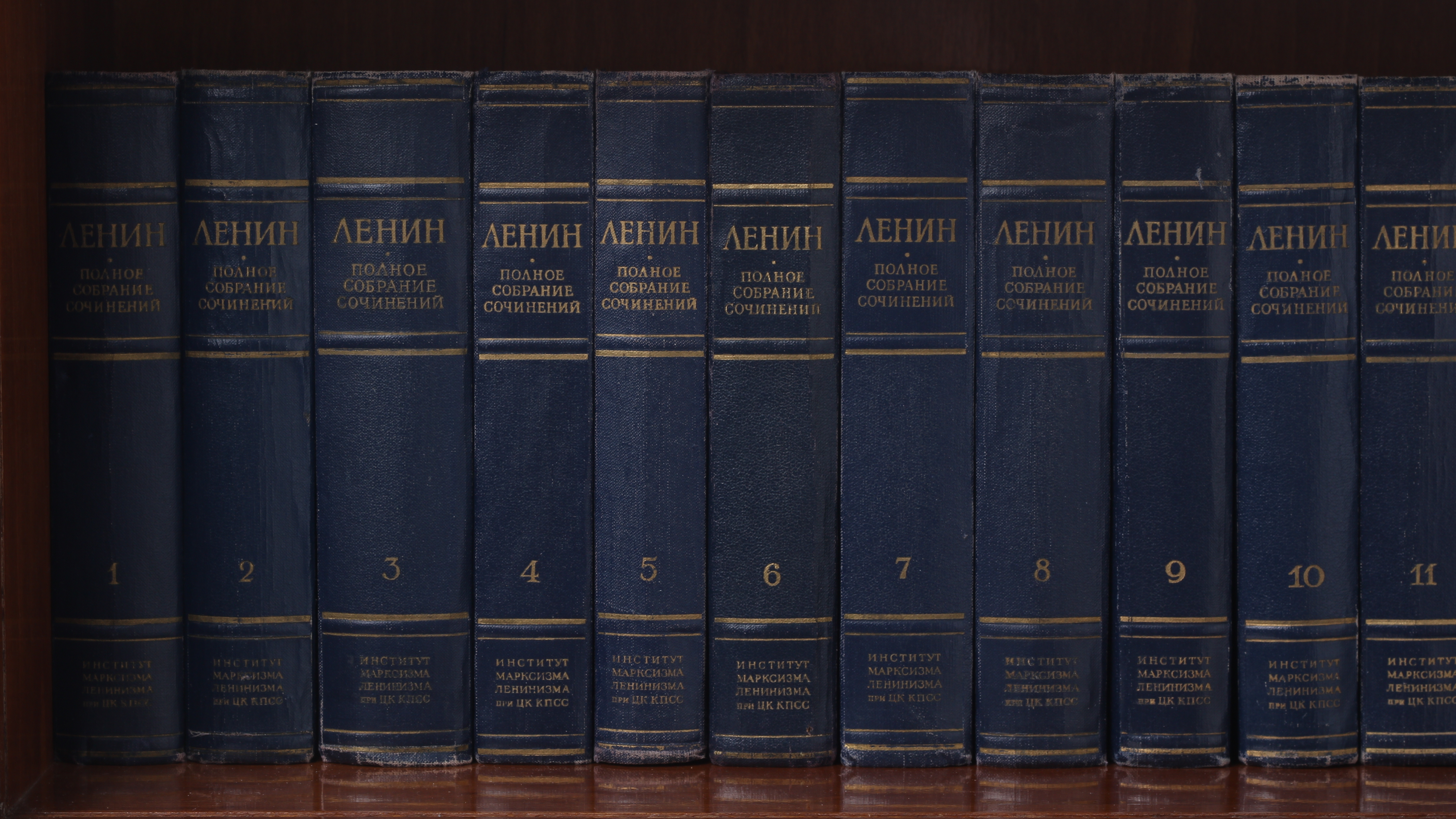 Полное собрание сочинений В.И.Ленина. Пятое издание.